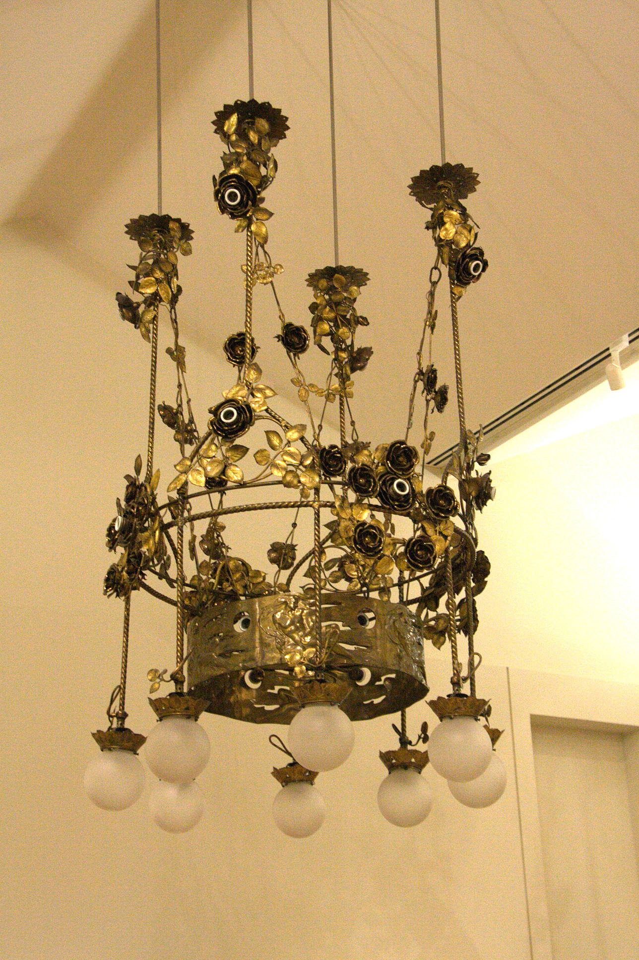 Palau Nacional (Barcelona). Làmpada del mobiliari de la casa Lleó Morera dissenyada per Gaspar Homar